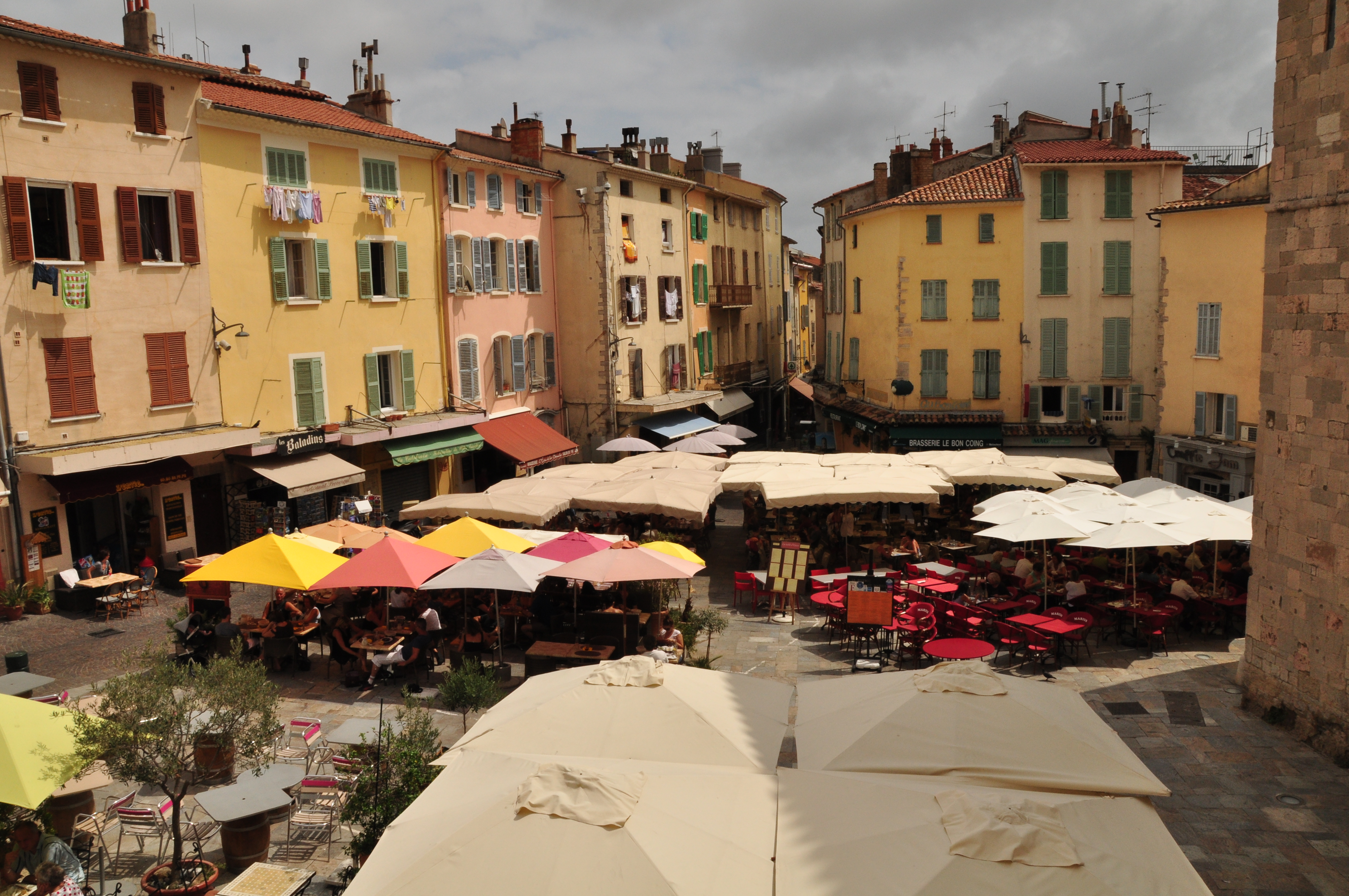 La place Massillon, en haut de la cité médiévale.